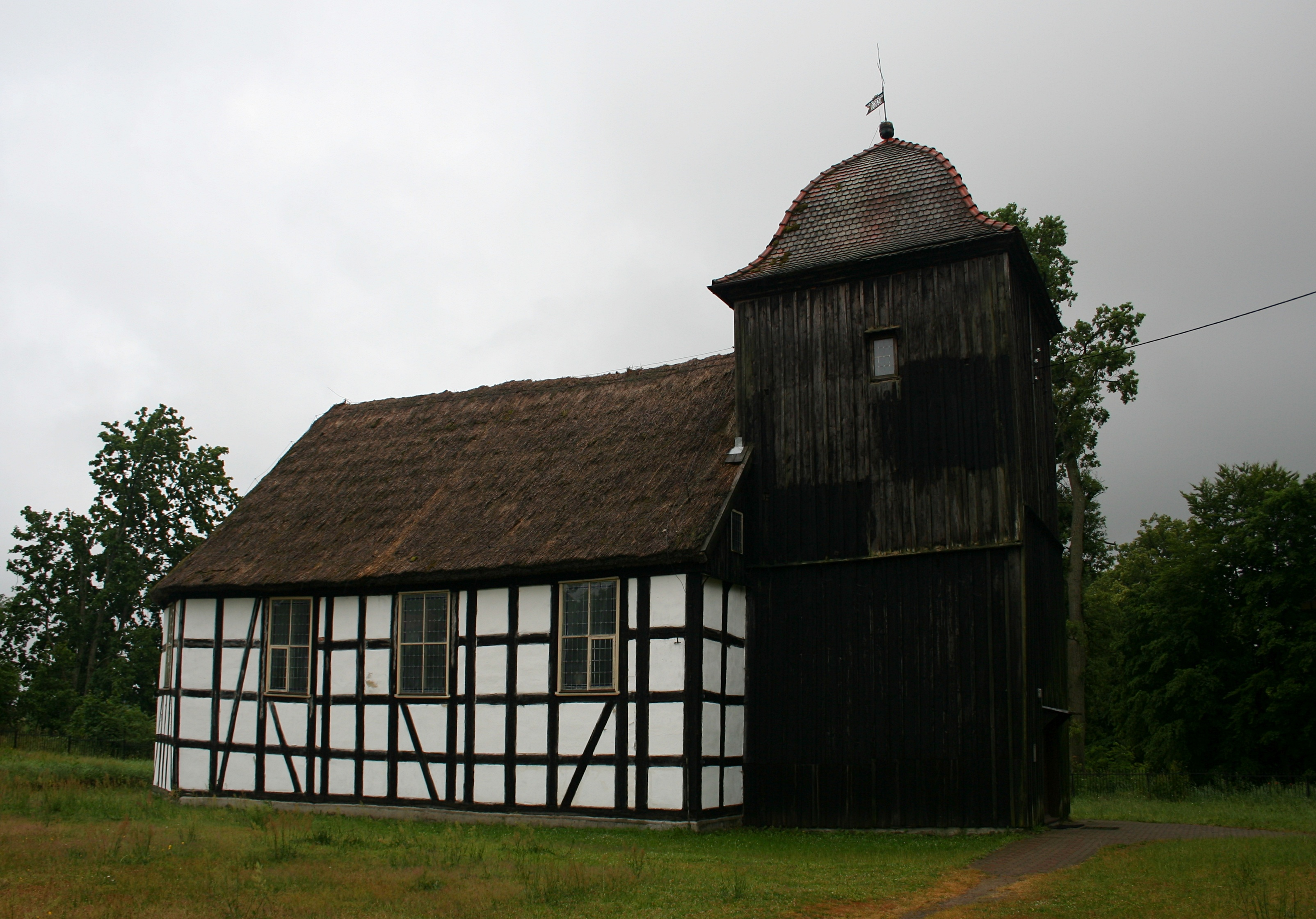 Szachulcowy kościół Bożego z 1699 roku w Jasieniu, powiat bytowski